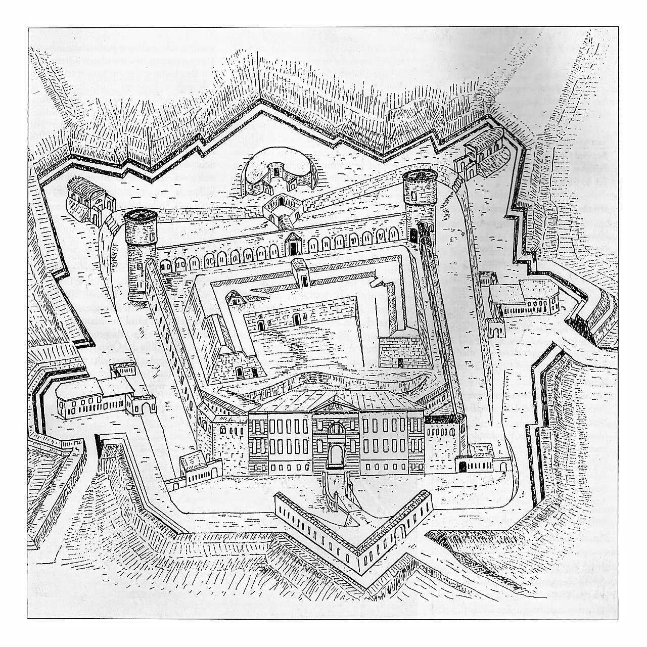 Situationsplan der Zitadelle Cyriaksburg 1870